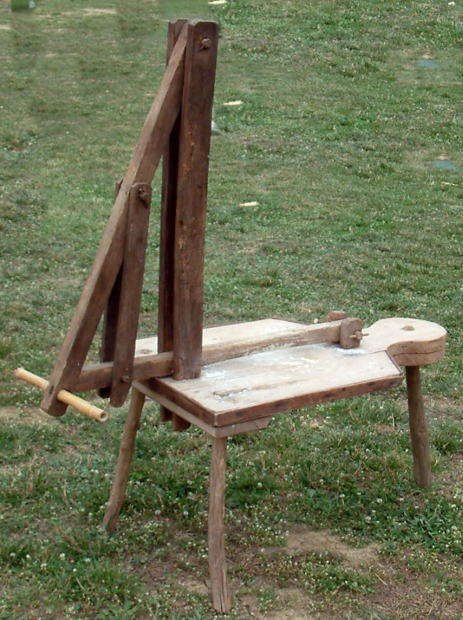 La gramolatrice è un'antica macchina usata in Romagna per impastare il pane.La pasta si metteva sotto la barra orizzontale e veniva schiacciata agendo sulla leva con entrambe le mani